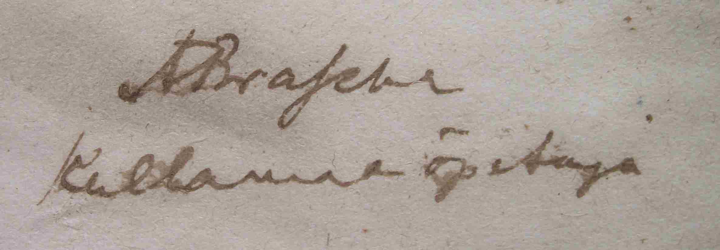 Kullamaa kirikuõpetaja Arvid Brasche autograaf